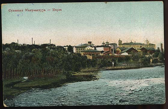 Narva kalevivabrik 20. sajandi alguses